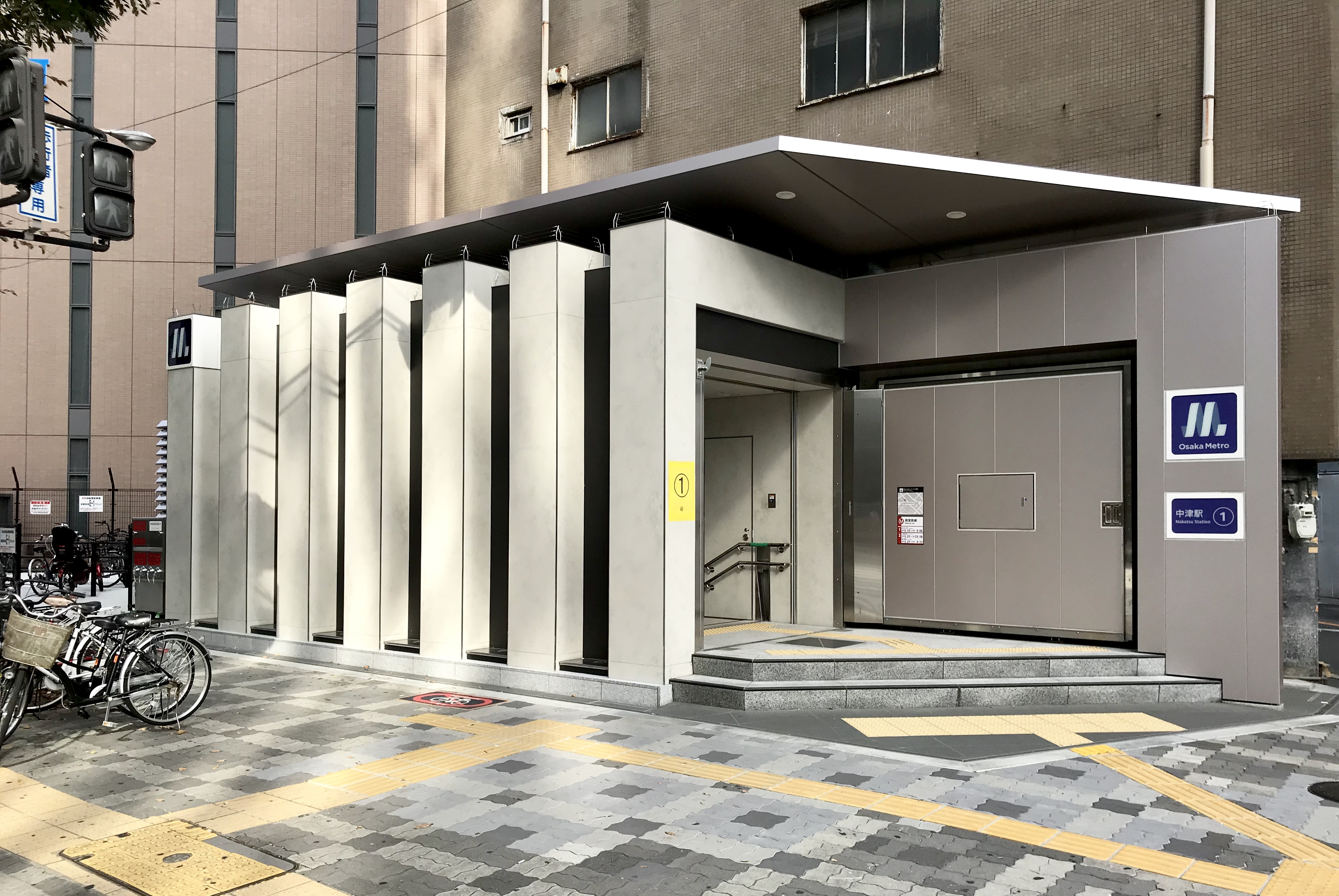 Osaka Metro中津駅1号出入口